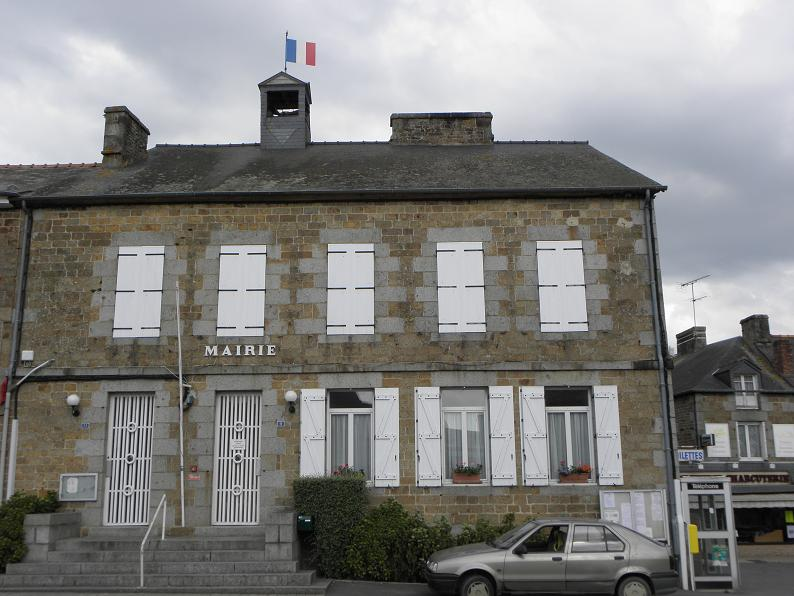 Mairie de Sens-de-Bretagne (35).